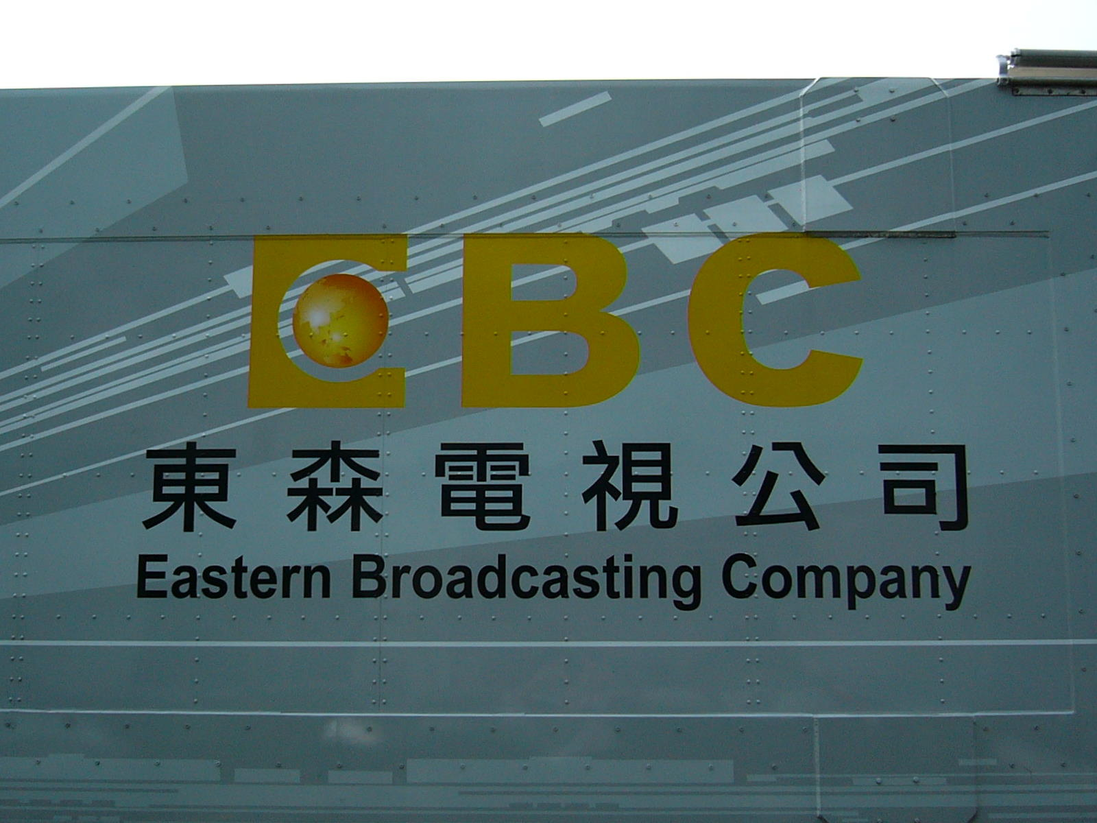 東森電視轉播車345-BJ右側車身的東森電視標誌（EBC版）。